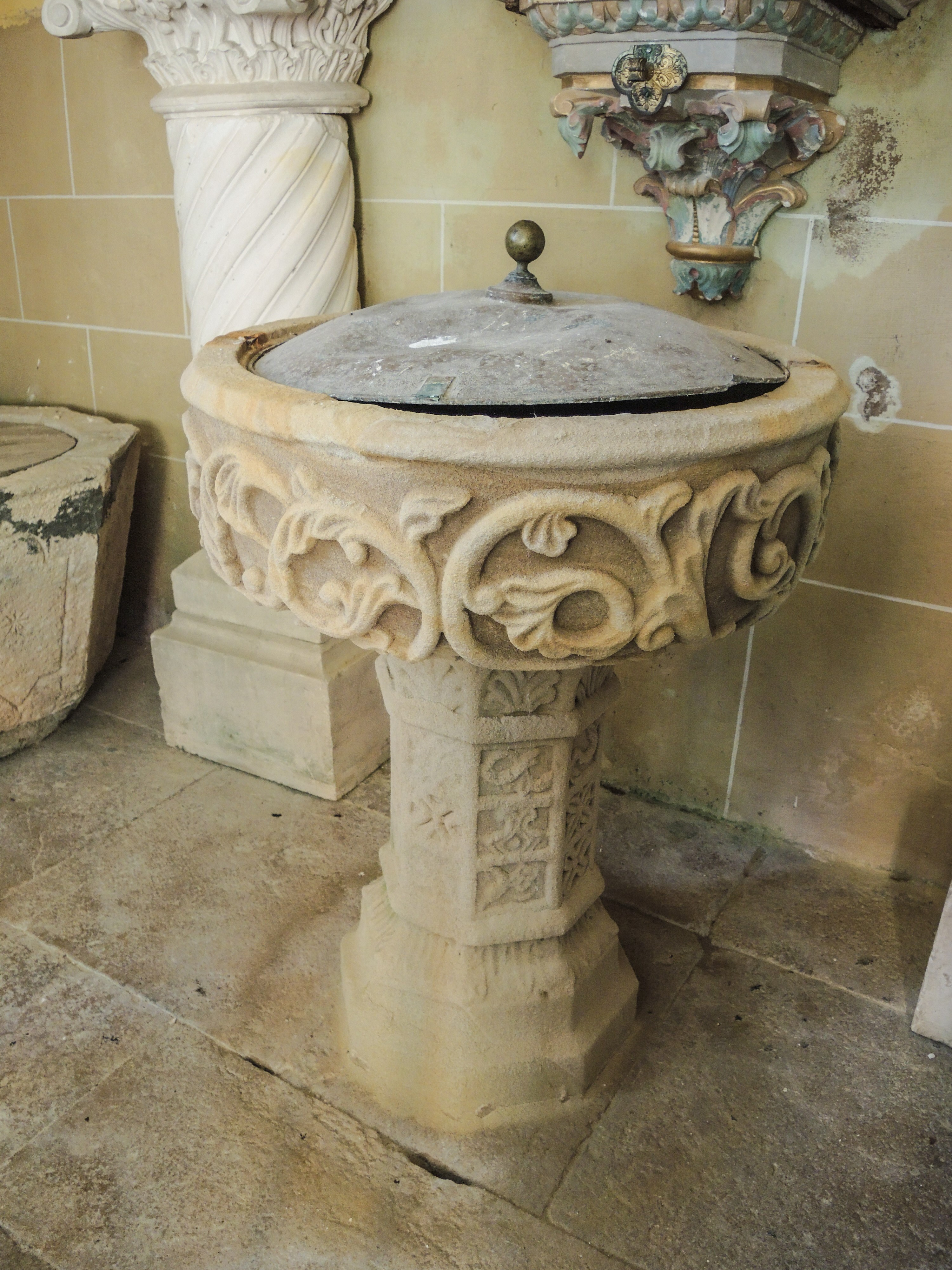 Baptistère de l'église Saint Dizier. Saint Dizier - l'Evêque. Territoire de Belfort